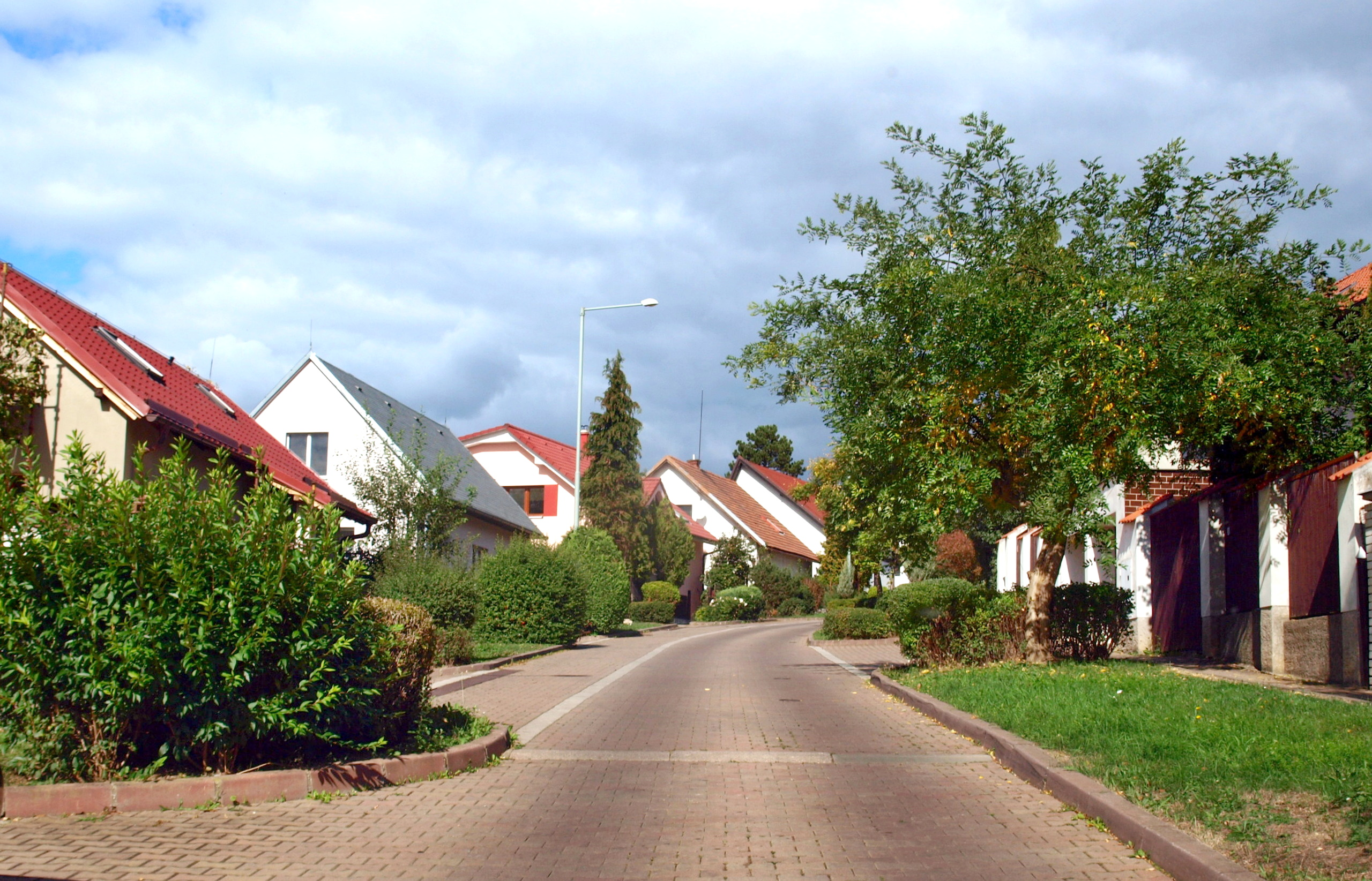 Praha 10-Petrovice